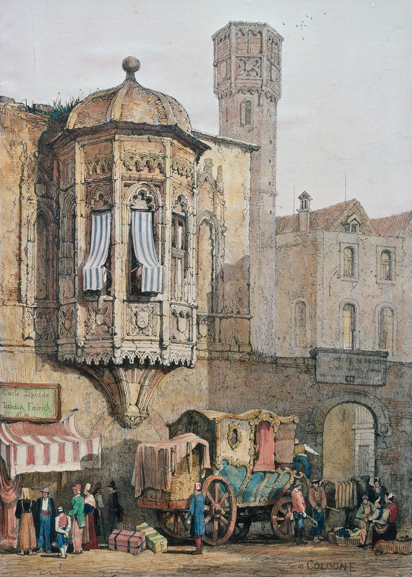 Köln - Hackenay Prager Hof Lithografie (1824)